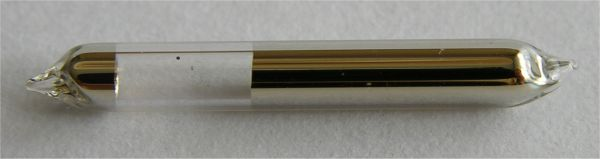 Bildbeschreibung: Cäsium in einer 50mg Mikroampulle. Quelle: selbst gemachtes Foto aus meiner Sammlung chemischer Elemente. Fotograf/Zeichner: Tomihahndorf Datum: März 2006 andere Versionen